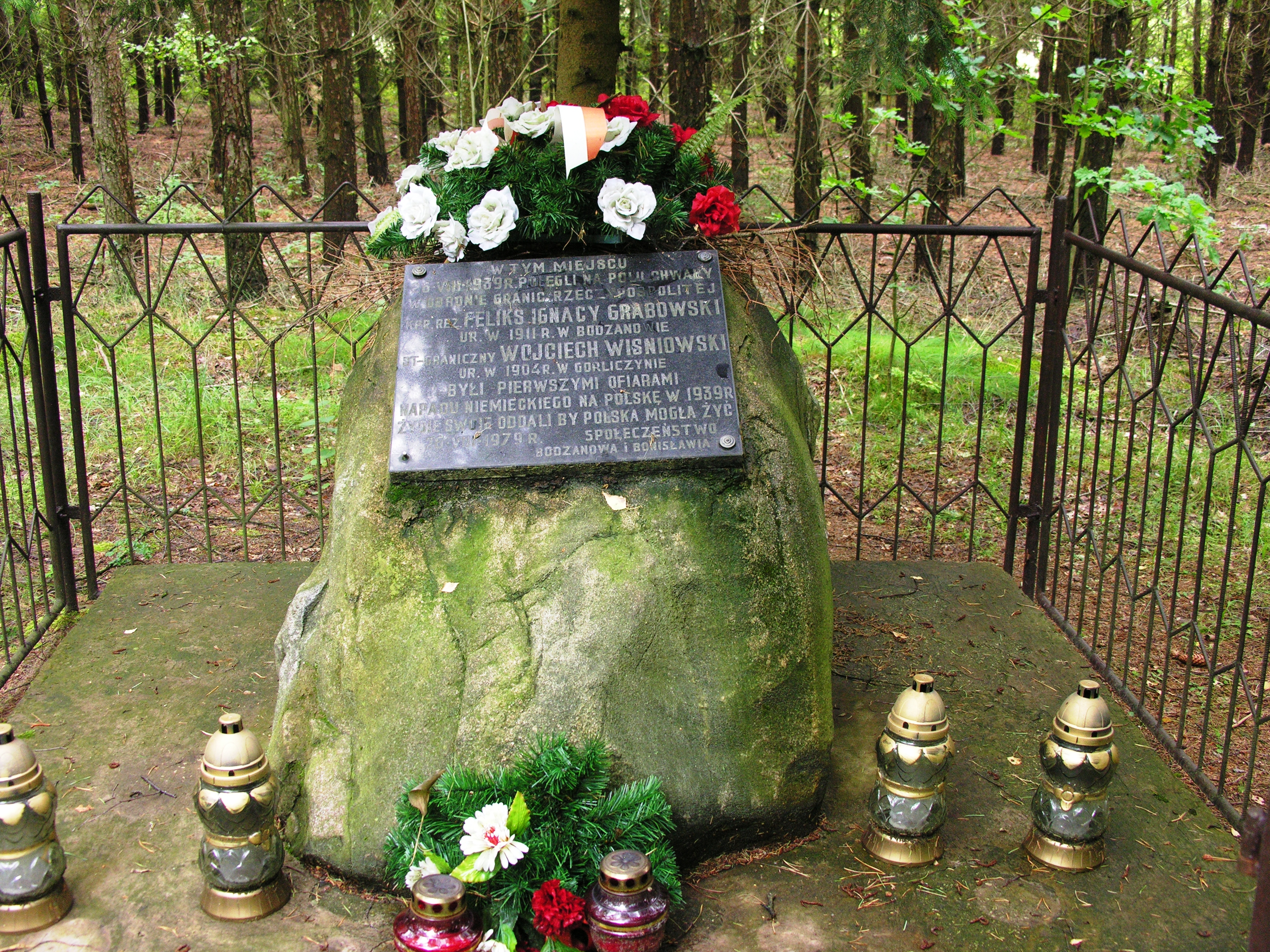 Położony w lesie przy dawnej granicy Polsko - Niemieckiej obelisk upamiętniający poległych żołnierzy Rzeczypospolitej